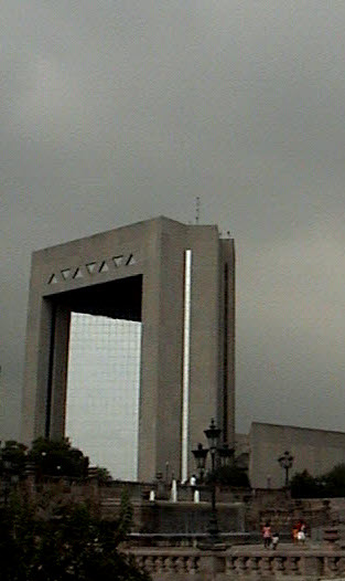 Palacio Legislativo arquitecto Oscar Bulnes Valero